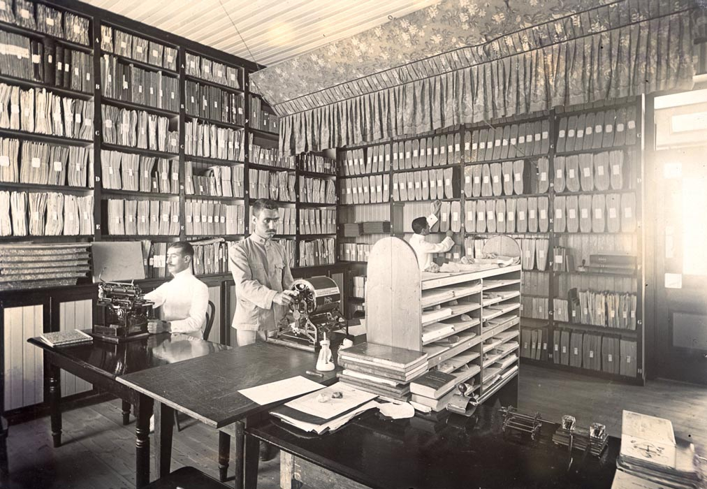 Alfândega. Arquivo